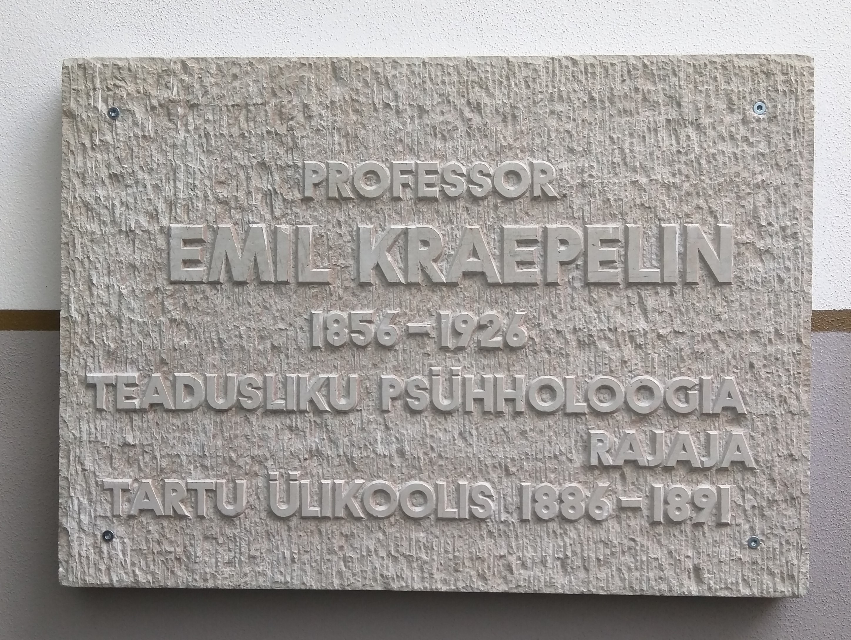 Memorial Tablet for Emil Kraepelin in Estonia, Tartu, Näituse 2